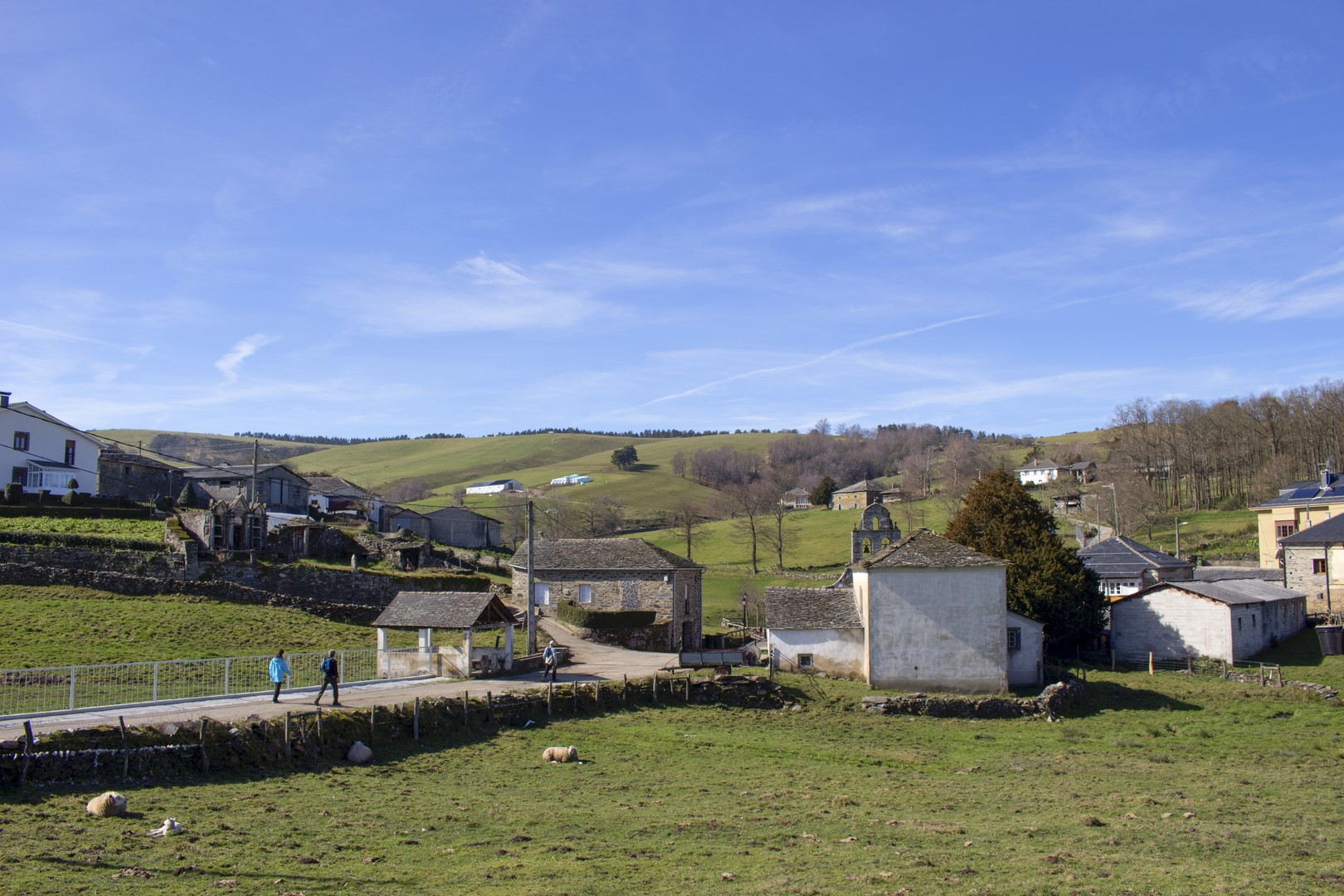 Lugar y parroquia del concejo de Allande (Asturias)